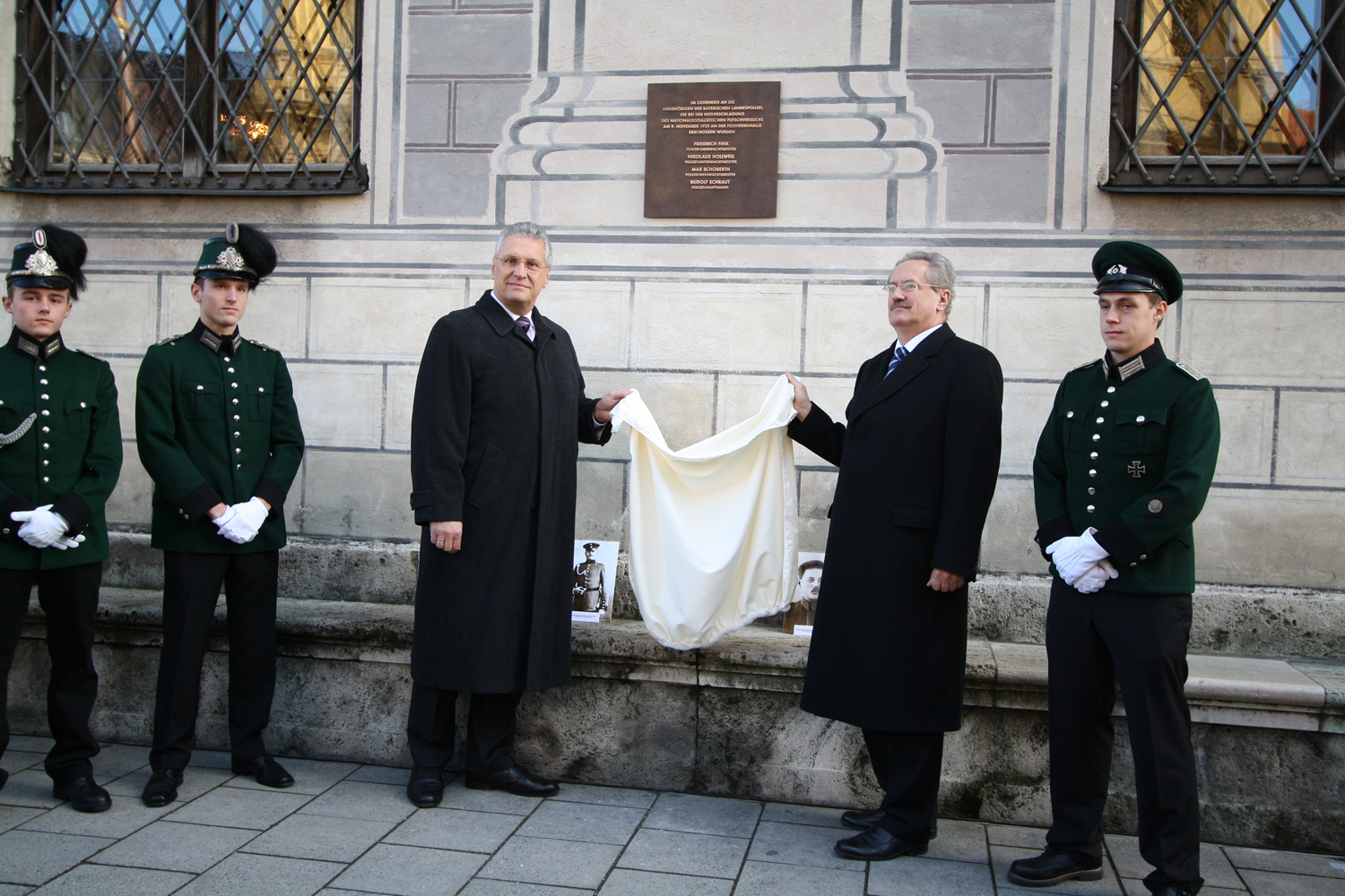 Der Bayerische Innenminister Joachim Herrmann und der Münchner Oberbürgermeister Christian Ude enthüllen eine Gedenktafel an der Münchner Residenz, die an die vier getöteten Polizeibeamten erinnert, die bei dem Schusswechsel während des Hitlerputsches am 9. November 1923 vor der Münchner Feldherrnhalle ums Leben kamen. Die drei jungen Männer tragen die Polizeiuniform von 1923.